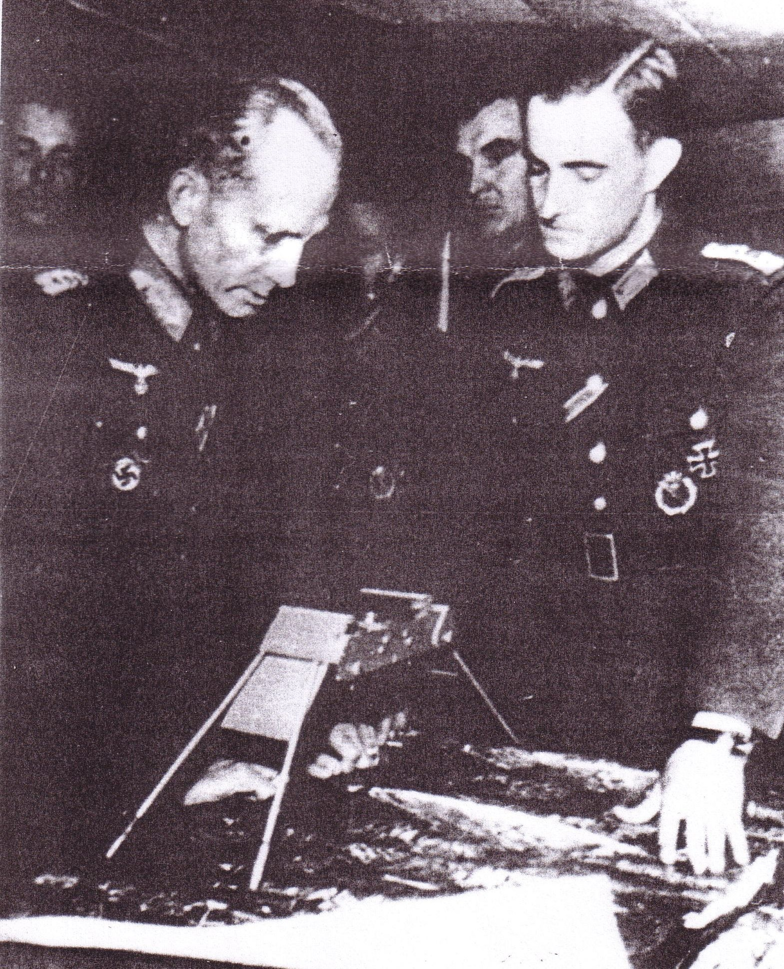 Hauptmann Fritz Milenz (* 1921 in Stettin; † 2007 in Hamburg), Regimentsadjutant des Grenadier-Regiments 509 beim Lagevortrag vor dem Divisionskommandeur der 292. Infanterie-Division, Generalmajor Rudolf Reichert, auf dem Regimentsgefechtsstand im November 1944 am Narew. Milenz war von Februar 1942 bis Oktober 1943 Ausbilder an der Heeresunteroffizierschule (Jägerkaserne Graf Yorck) in Ortelsburg